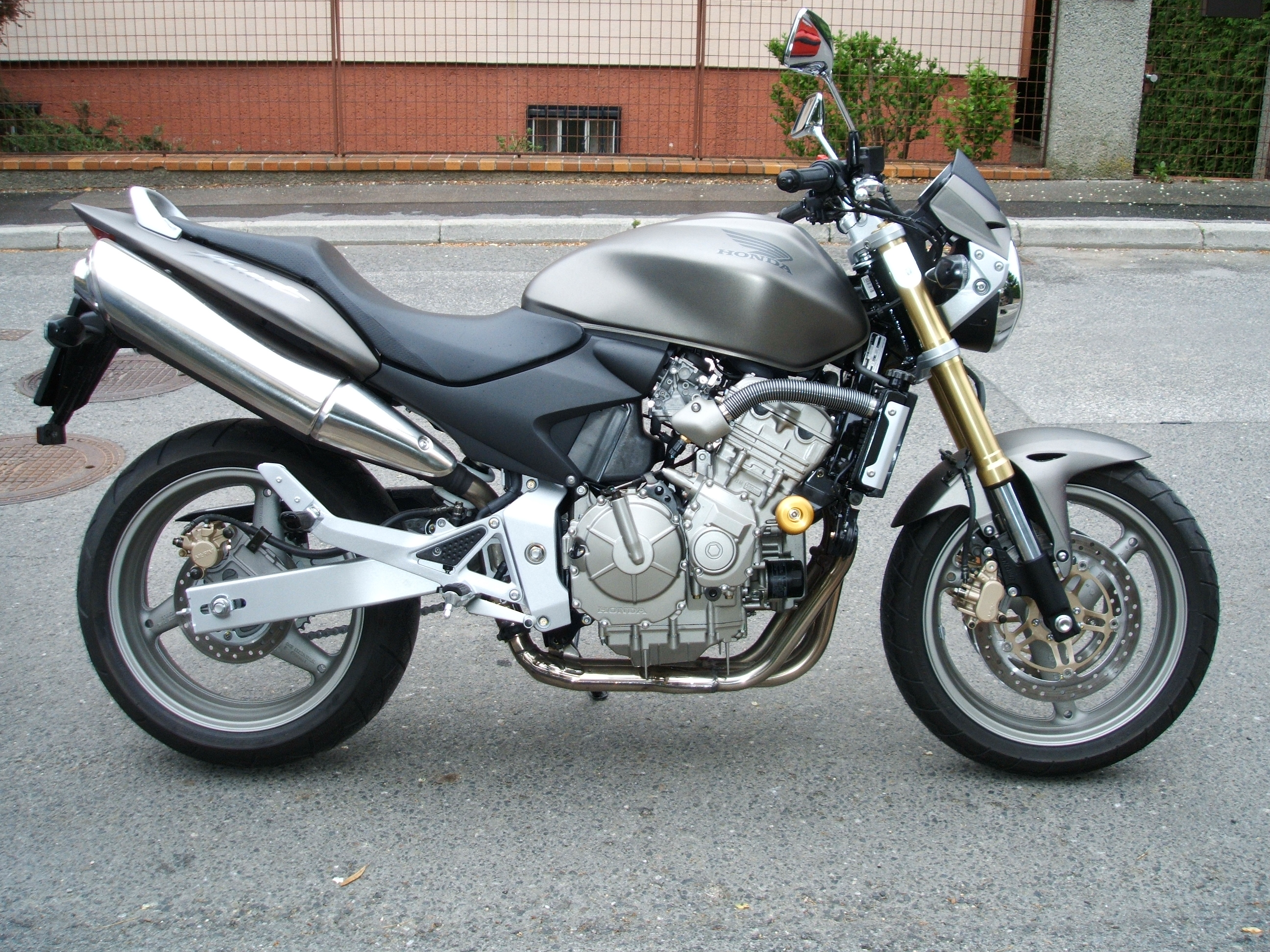 Honda CB600F Hornet Modell 2005/2006 model